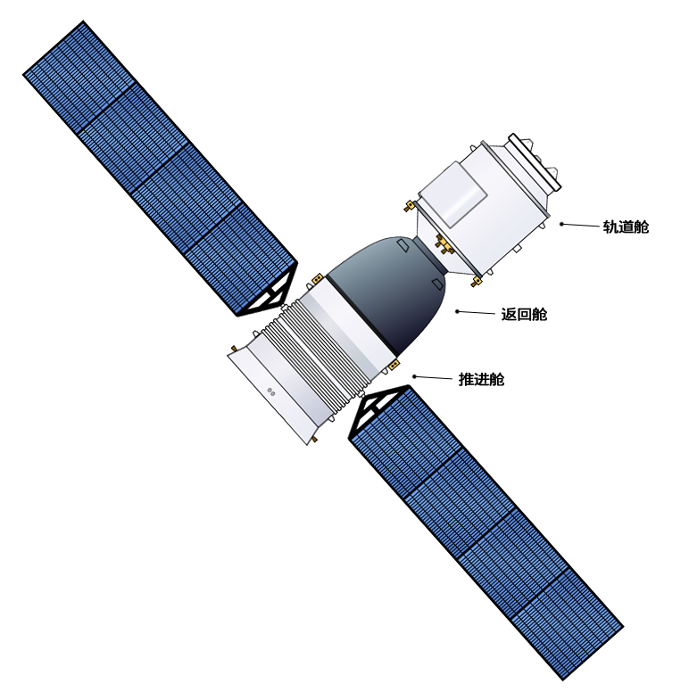 神舟飞船的概念图